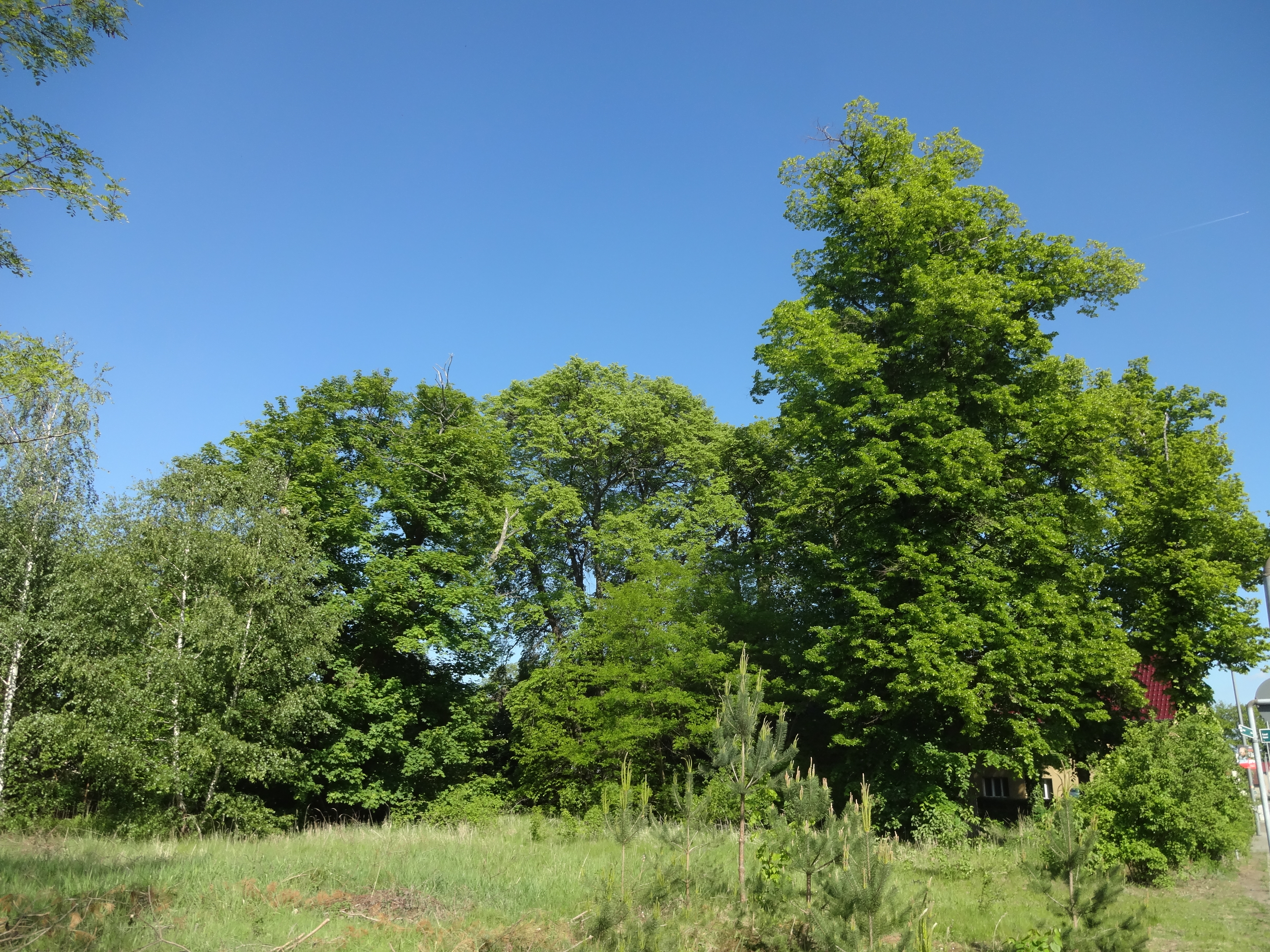 Nautrdenkmal Winterlinde auf dem Grundstück des ehemaligen Kulturhauses an der Hauptstraße in Guteborn